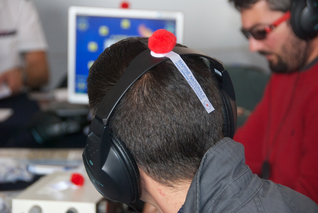 Tonnerres de Brest 2012 Casque de sous marinier